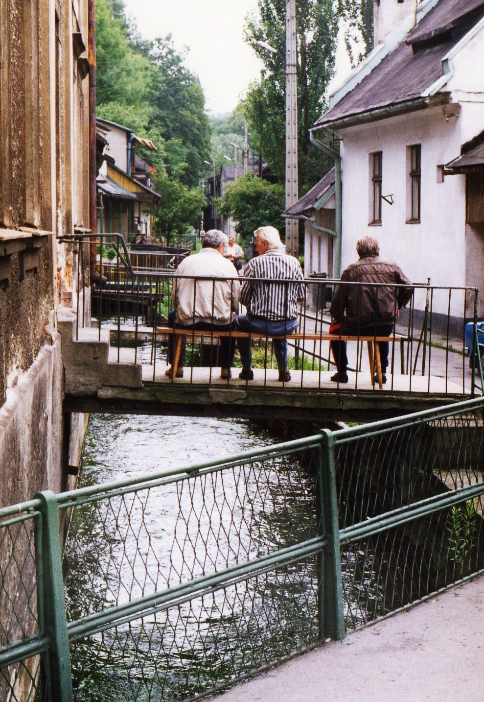 Zabytkowe budynki przy ulicy Przykopa w Cieszynie.